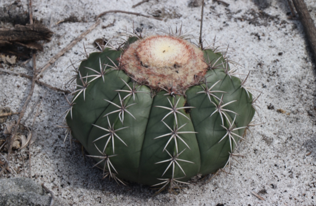 Melocactus violaceus ssp. ritteri Bahia Brasil